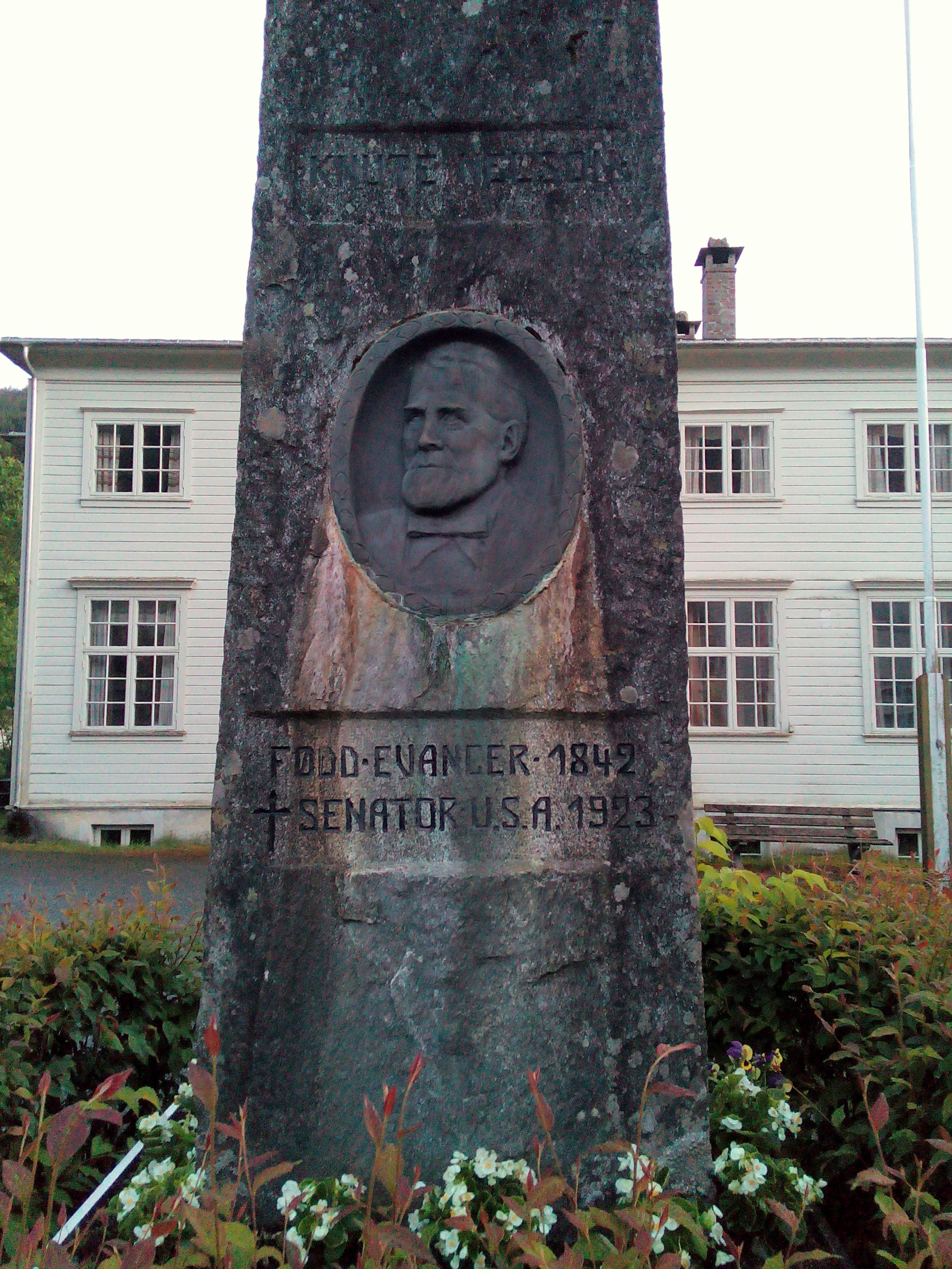 Пам*ятний знак на честь сенатора Кнута Нельсона в Евангері, що в Норвегії Knute Nelson memorial sign in Evanger.